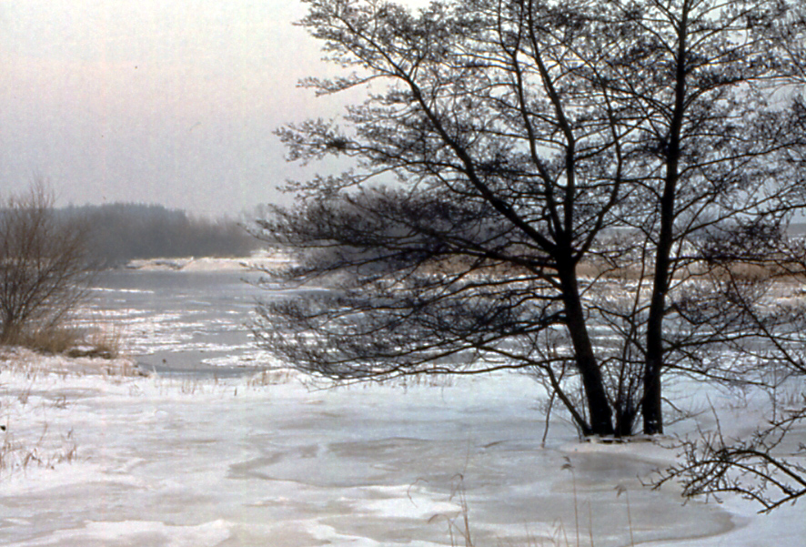 Eisgang der Weser in Bremen 1982. Vorher waren die Ränder des Flusses während Hochwassers gefroren, so dass in der Ufervegetation eine Eisschicht hing.